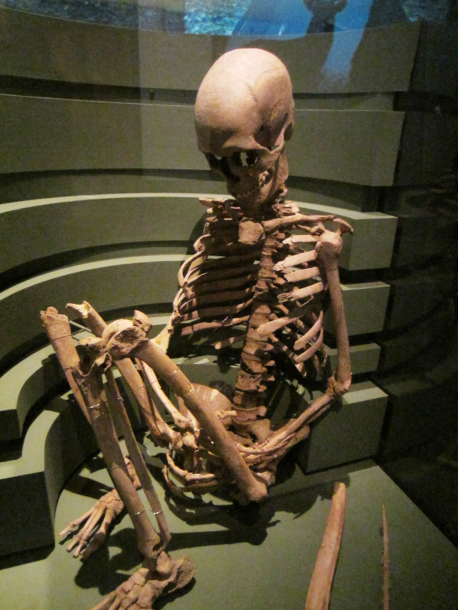 Stenålderskvinnan Bäckaskogskvinnan.